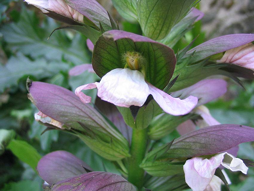 Fleur d'Acanthus mollis. Photo prise à Saint-Miche-de-Llotes en juin 2004